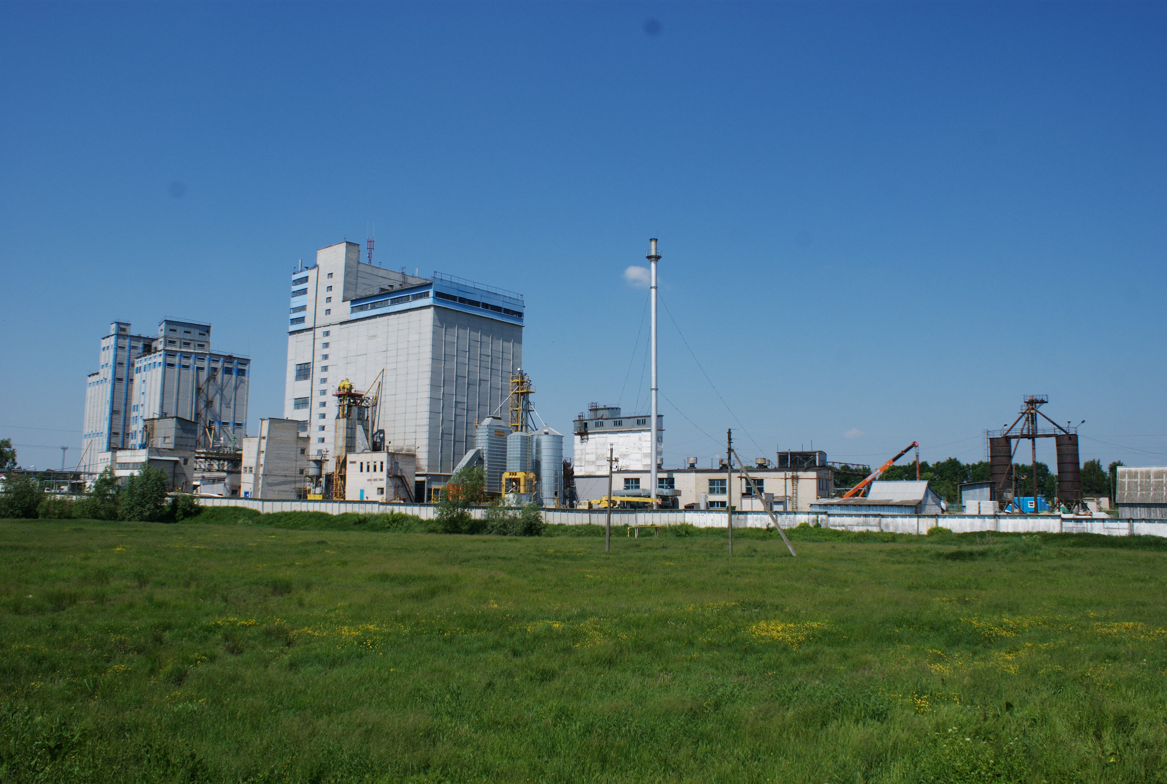 Zhabinka feed mill OJSC